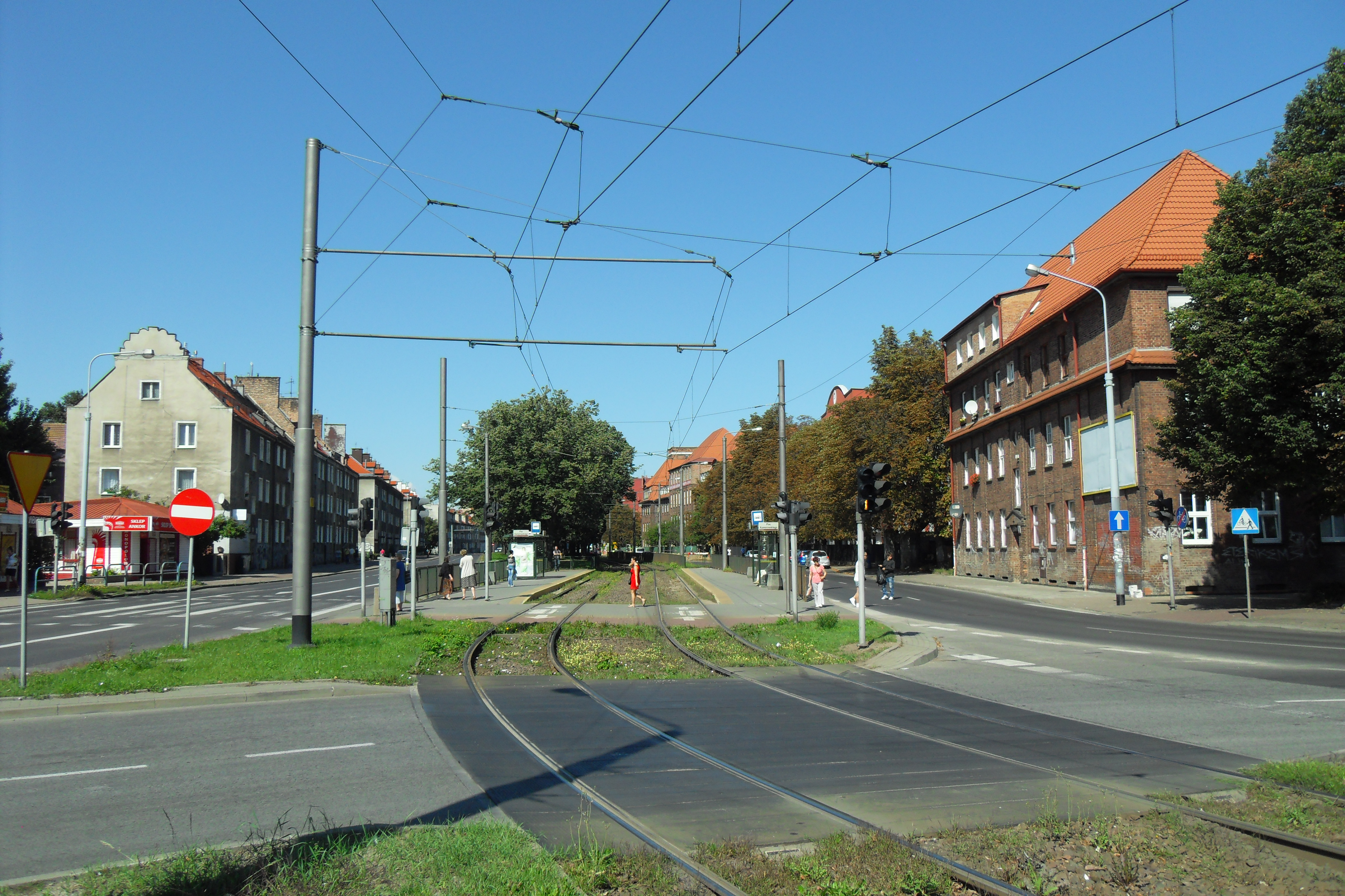 Gdańsk Wrzeszcz Dolny, al. Legionów.